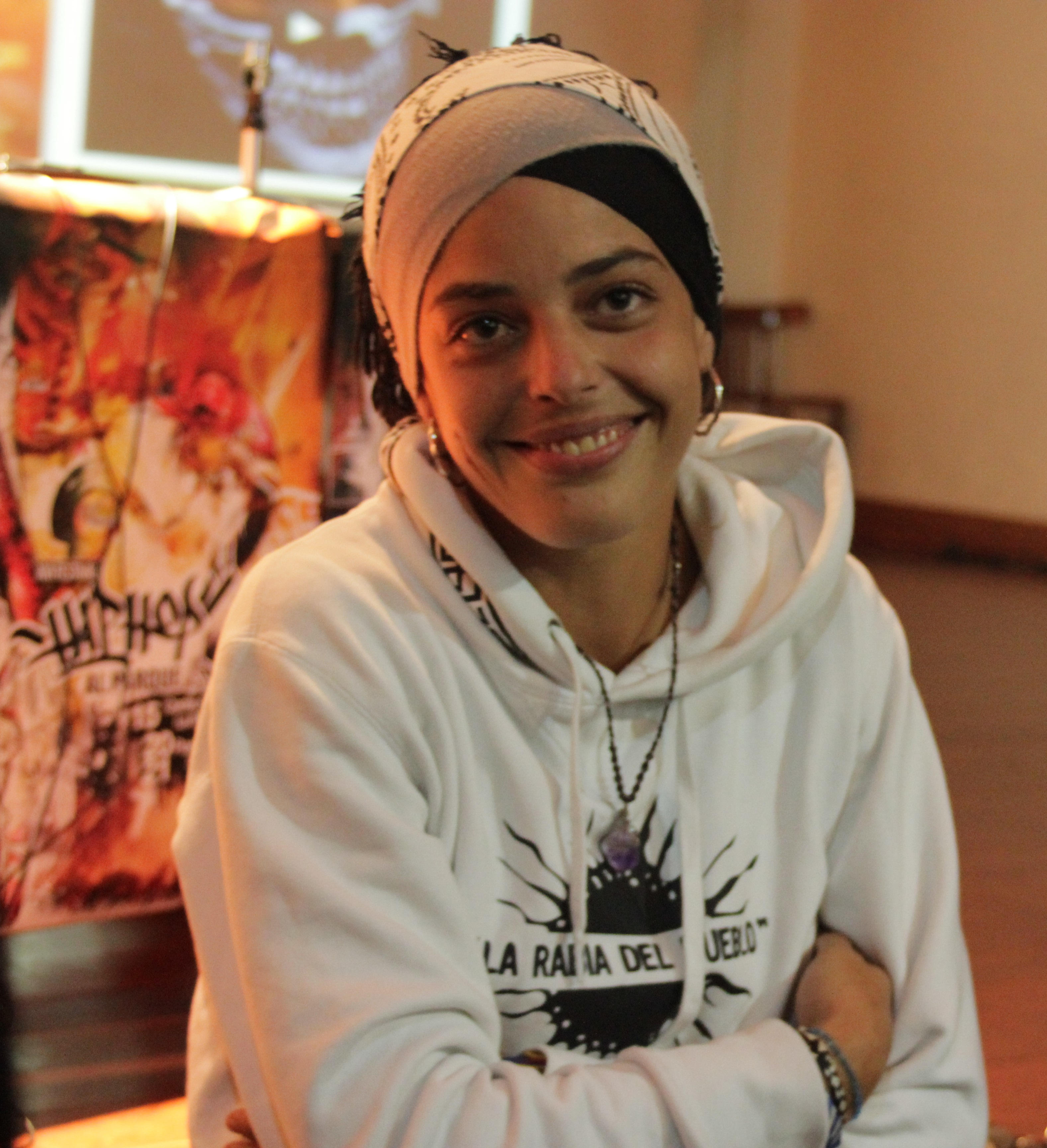 Keny Arkana, lors du Hip Hop al parque 2012.